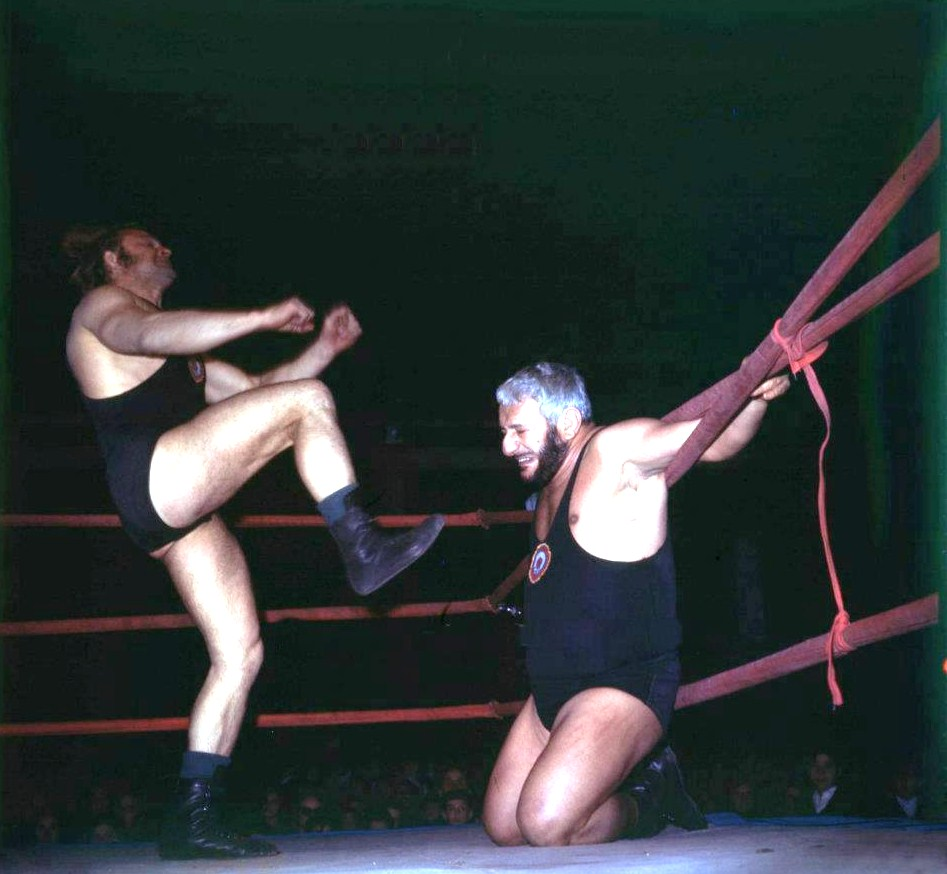 combate entre Karadagián y Iván Kowalski